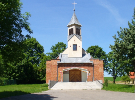 Kaplica w Szczodrkowicach